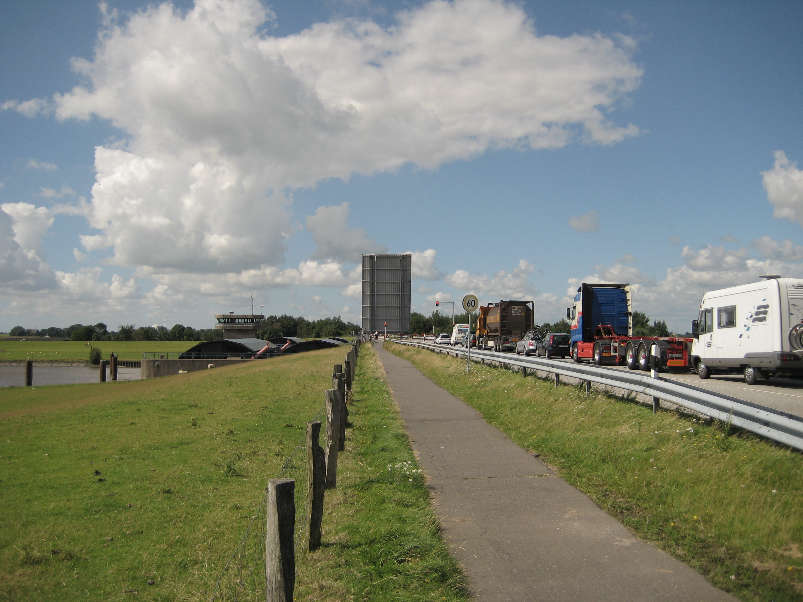 Sperrwerk der Stoer, Germany